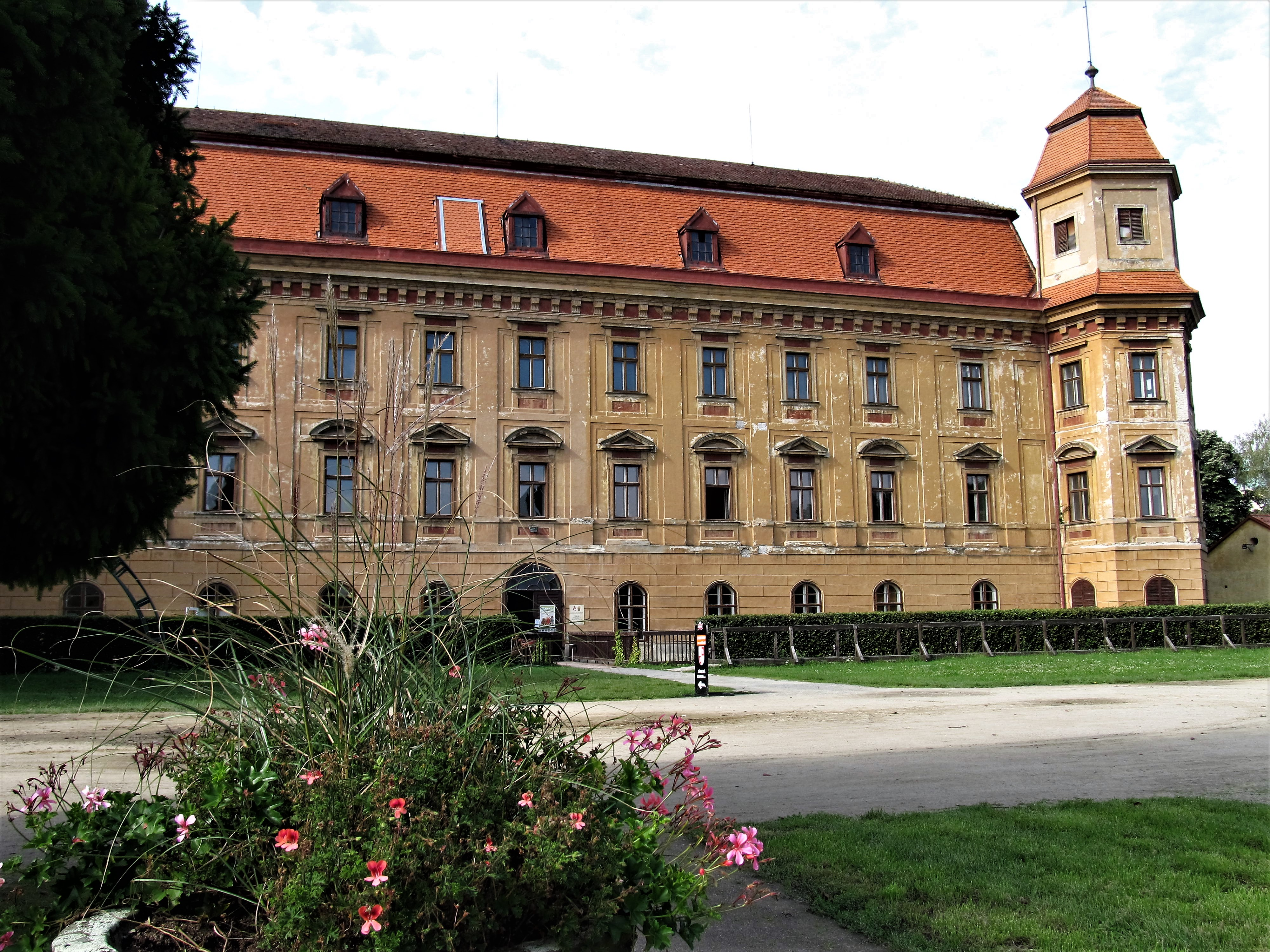 Pohled na zámek ze zahrady